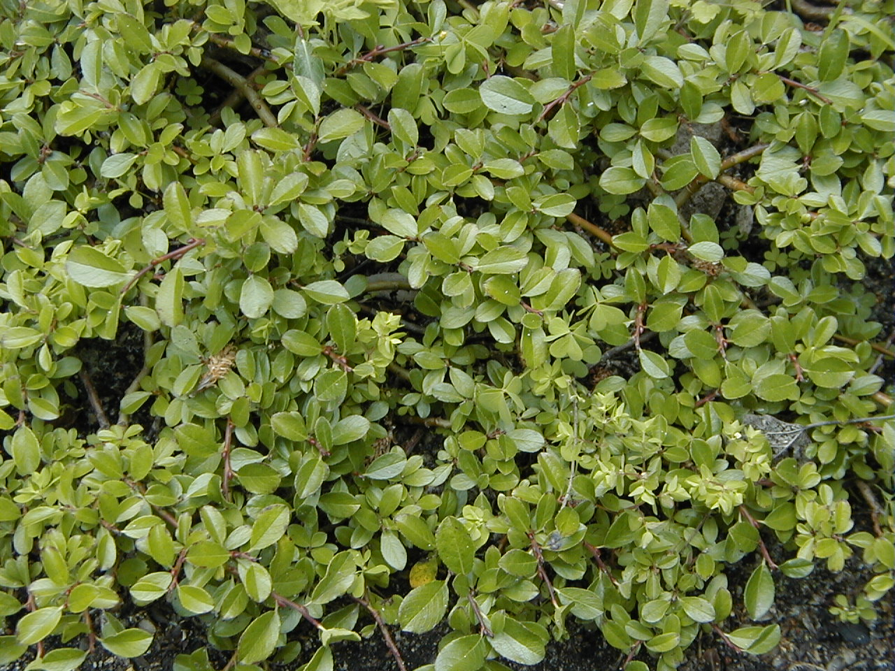 Salix uva-ursi. Real Jardín Botánico, Madrid